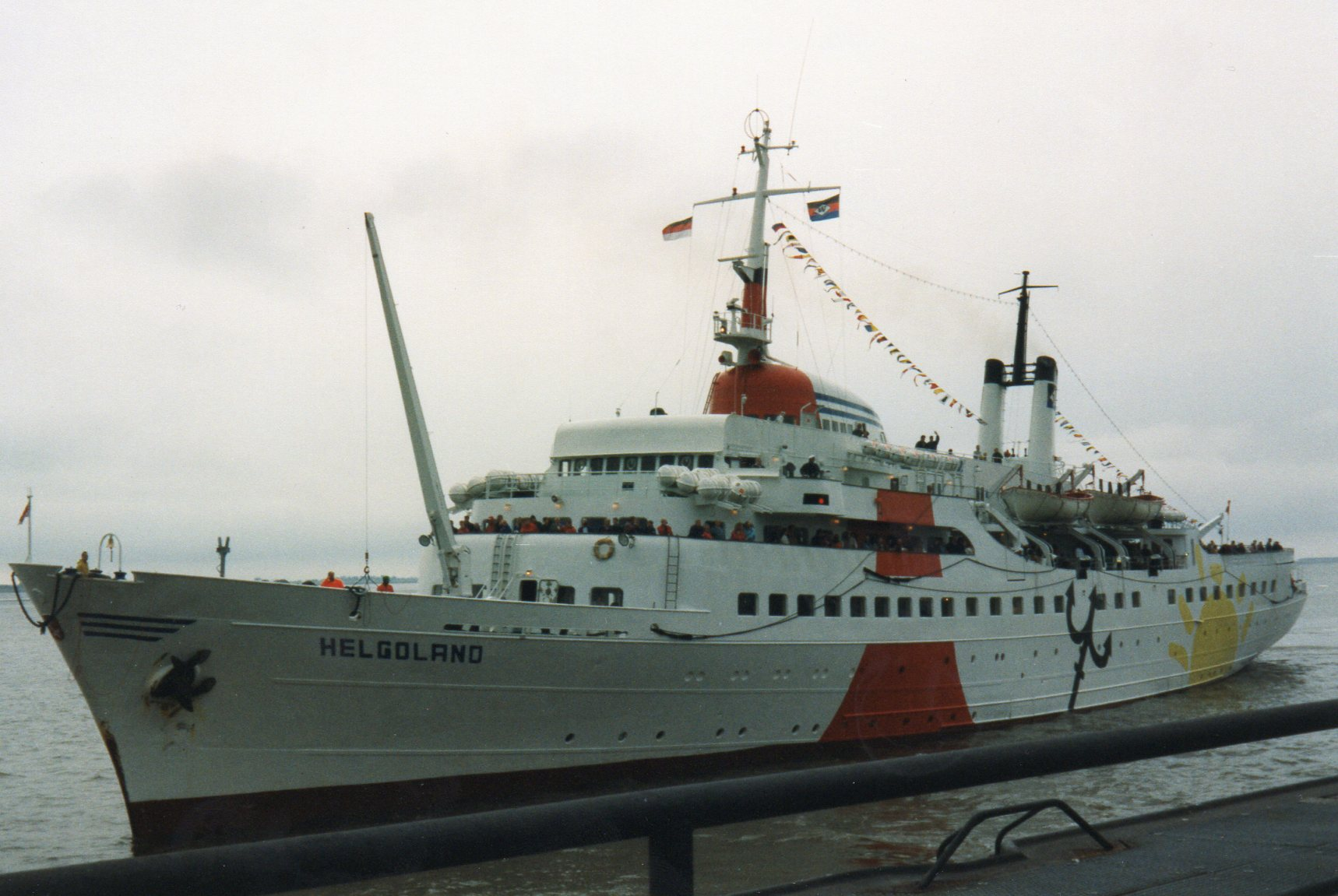 MS Helgoland 1996 bei der Ankunft in Bremerhaven von Helgoland kommend (am Tag des Helgoländer Inselfestes)